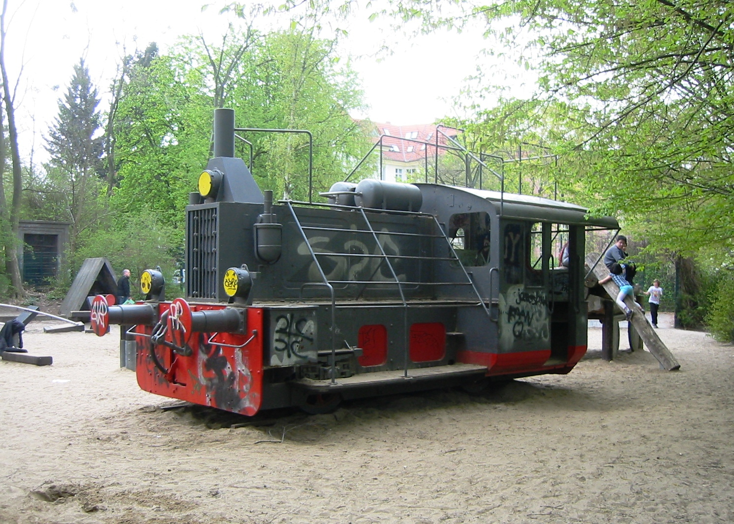 Lokomotive Jung NDR 130 im Bosepark in Berlin-Tempelhof